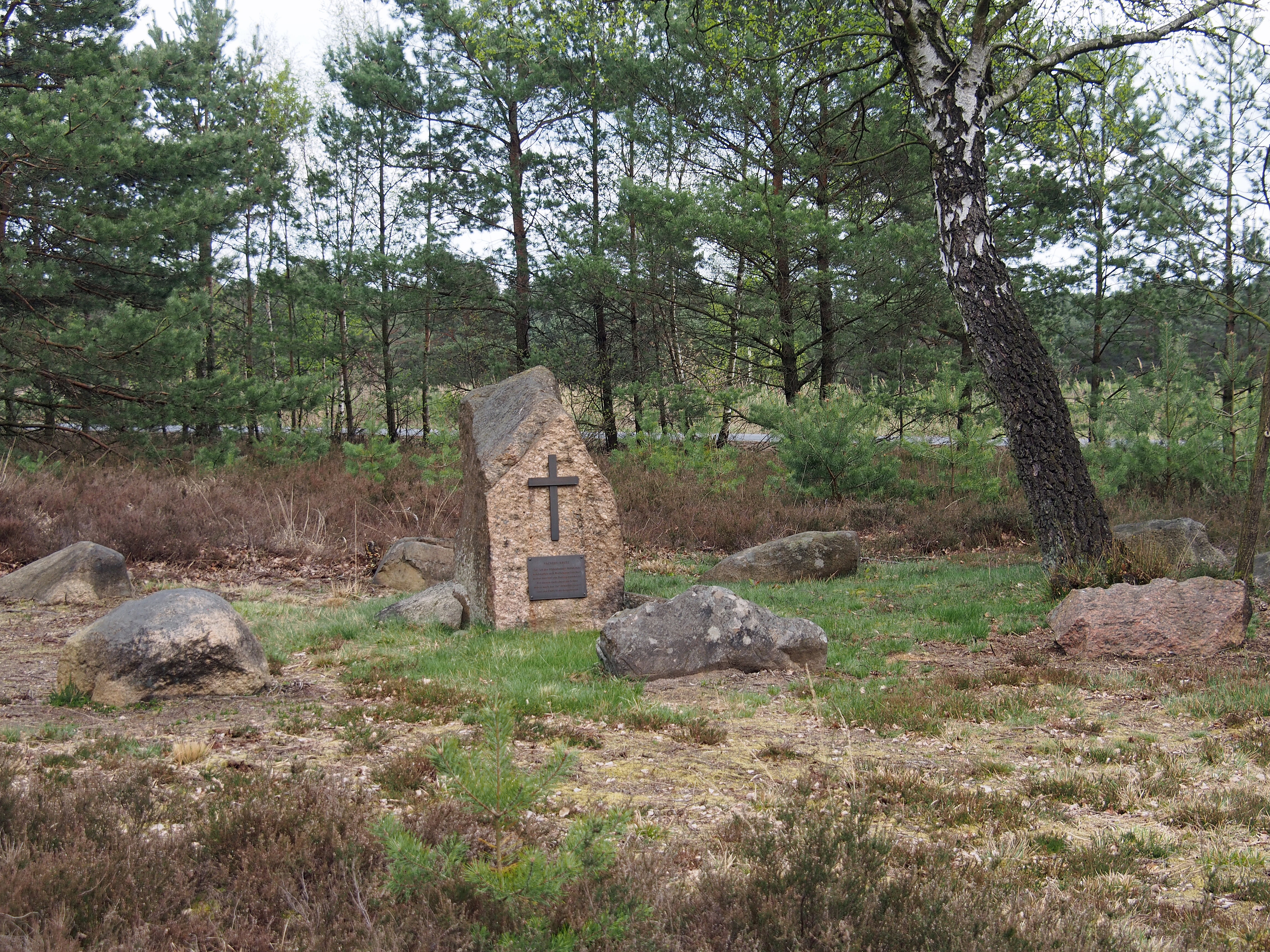 Gedenkstein "Sackers-Kruez" auf dem Truppenübungsplatz Munster Süd. Zum Gedenken an einen zur Zeit der Hildesheimer Stiftsfehde 1519 bei der Schlacht bei Soltau an dieser Stelle verbluteten Welfen-Herzog. Tafelinschrift: „SACKERS-KRUEZ Zur Zeit der Hildesheimer Siftsfehde bekämpften sich Welfengeschlechter, wobei hier 1519 ein Herzog verblutete. Bei diesen Gefechten um Soltau wurde auch der Ort MUNSTER zerstört und der EMHOF niedergebrannt.“